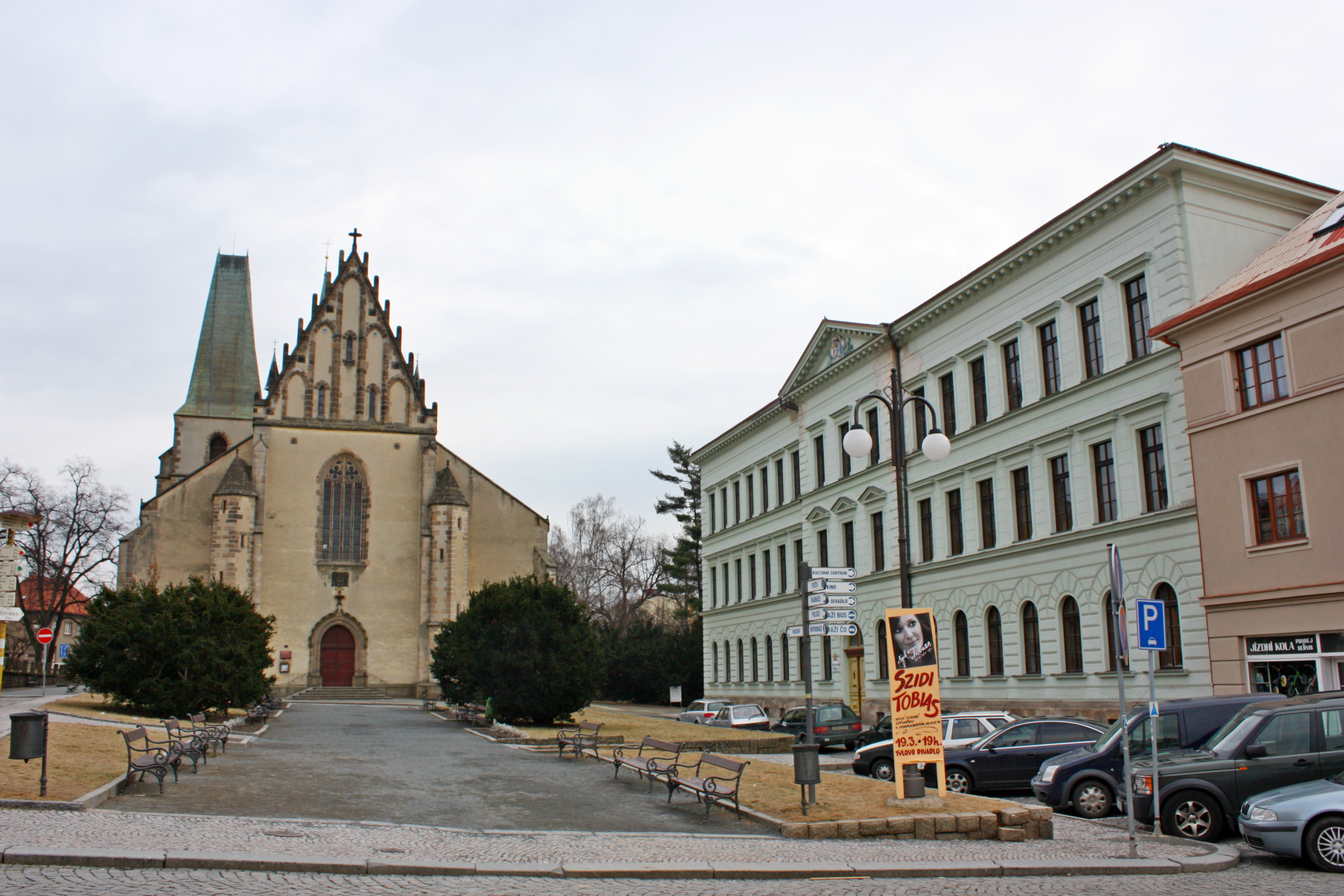 Kostel sv. Bartoloměje a základní škola na hlavním náměstí v Rakovníku.